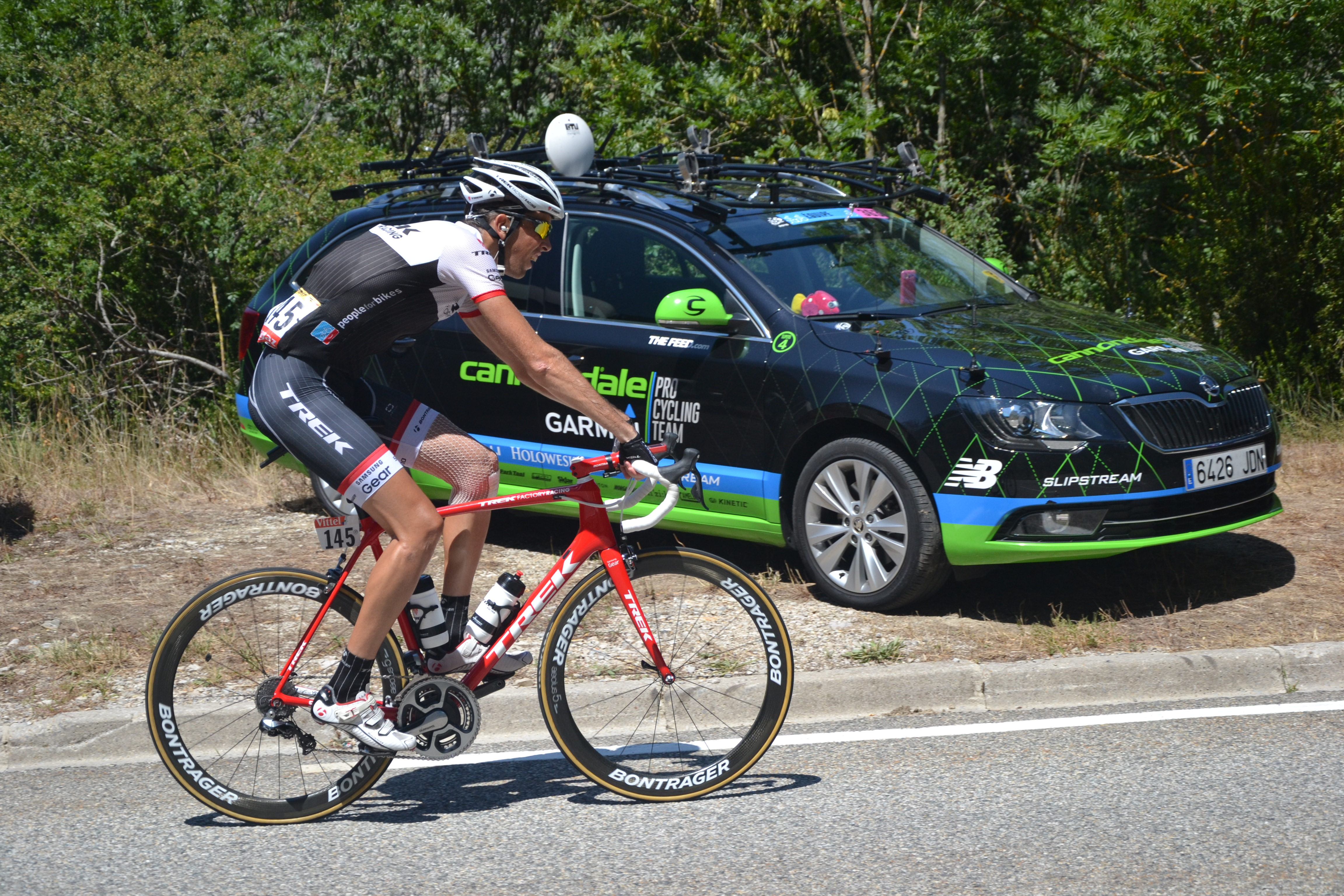 Durant l'étape 16 du Tour de France 2015